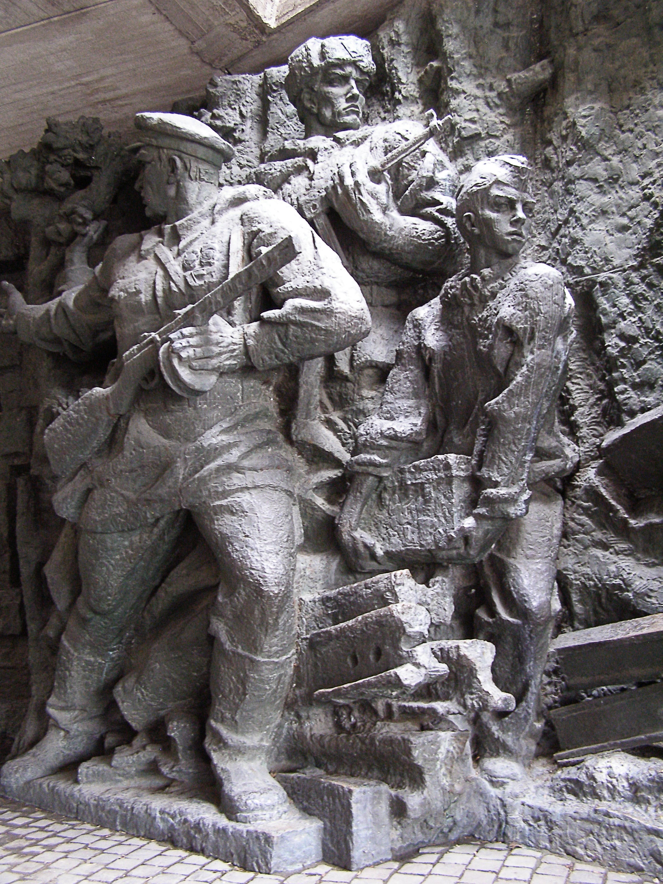 Скульптура партизан в Киевском музее ВОВ